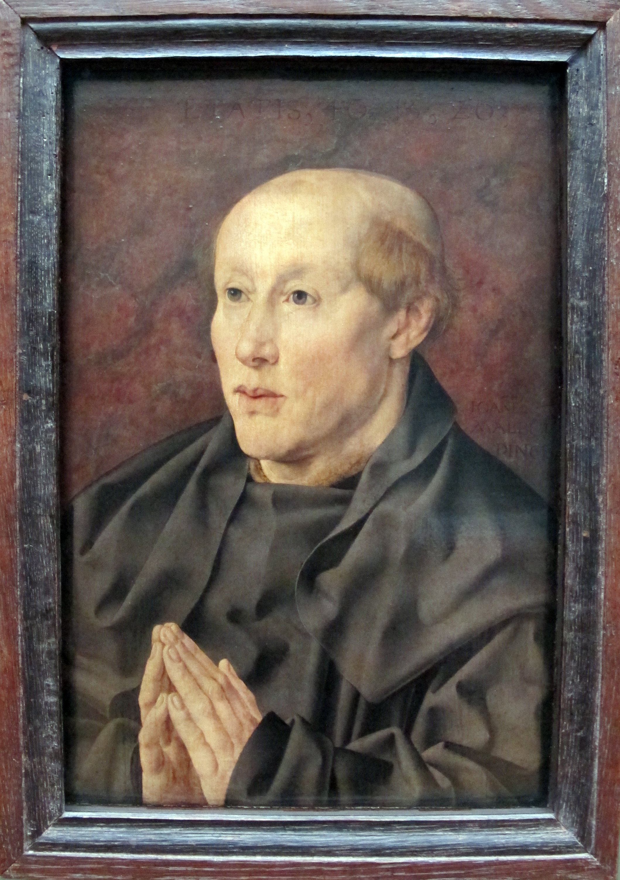 Pittura fiamminga al Louvre, Parigi